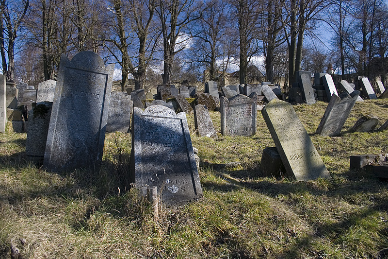 Židovský hřbitov v Šafově, okr. Znojmo